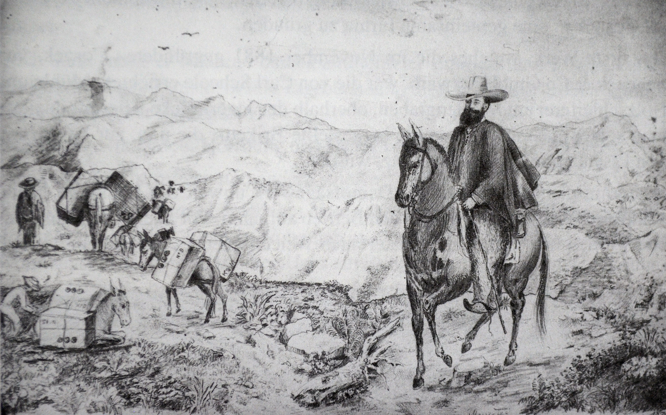 Friedrich von Schenck in Mittelamerika, Zeichnung von 1878